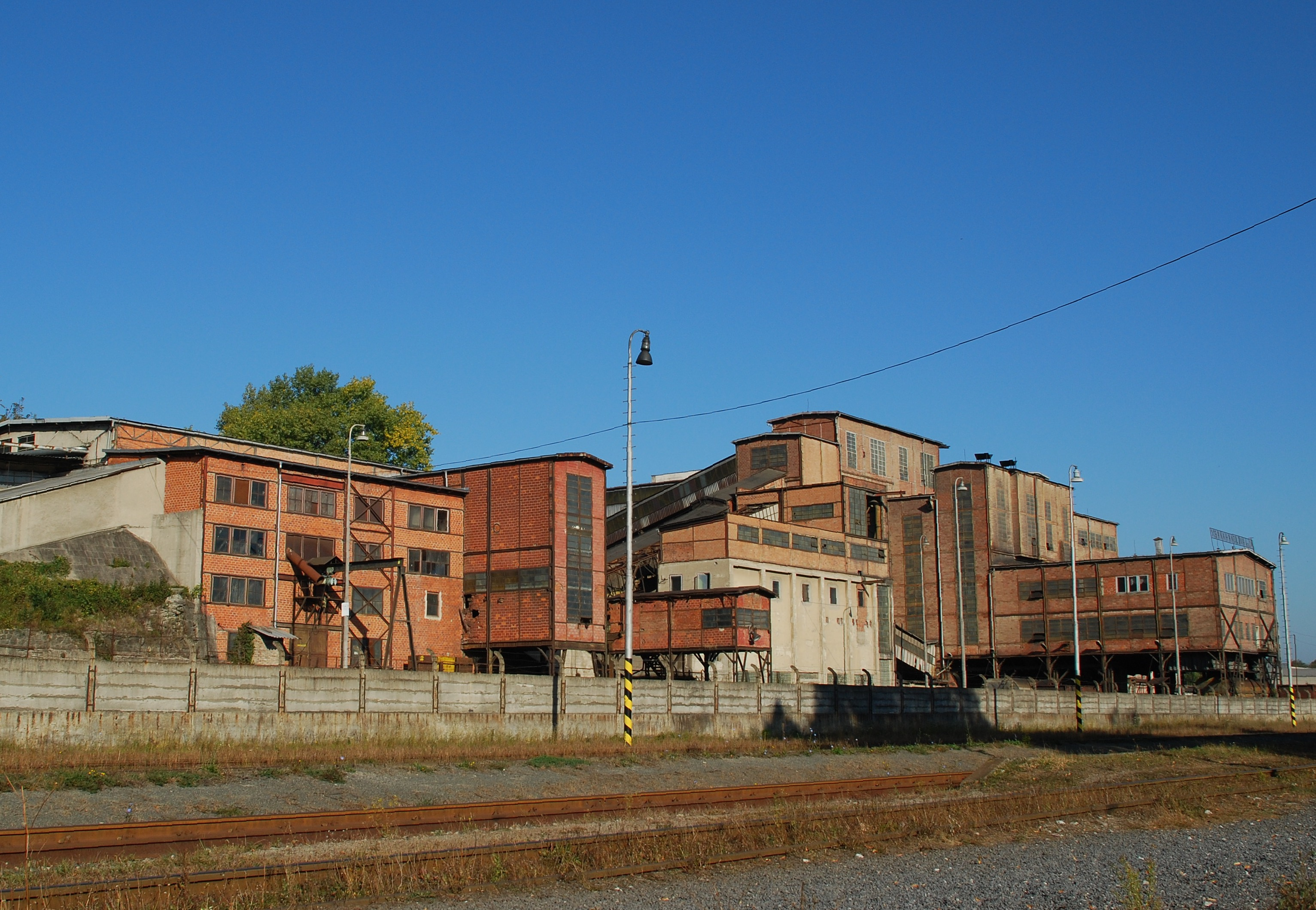 Handlová, budova banského triediča uhlia. Industriálna pamiatka